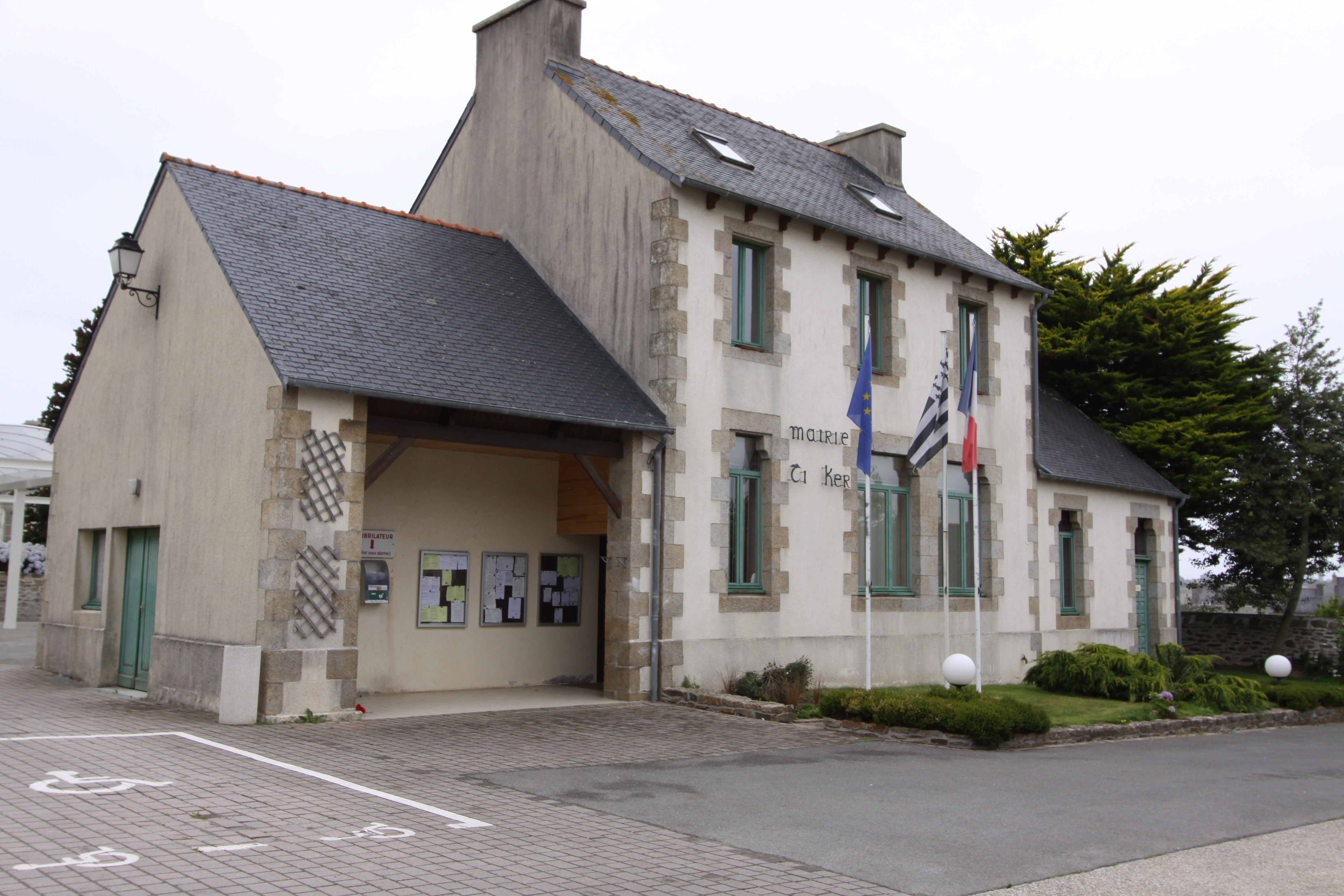 Mairie de la commune de Tréglonou